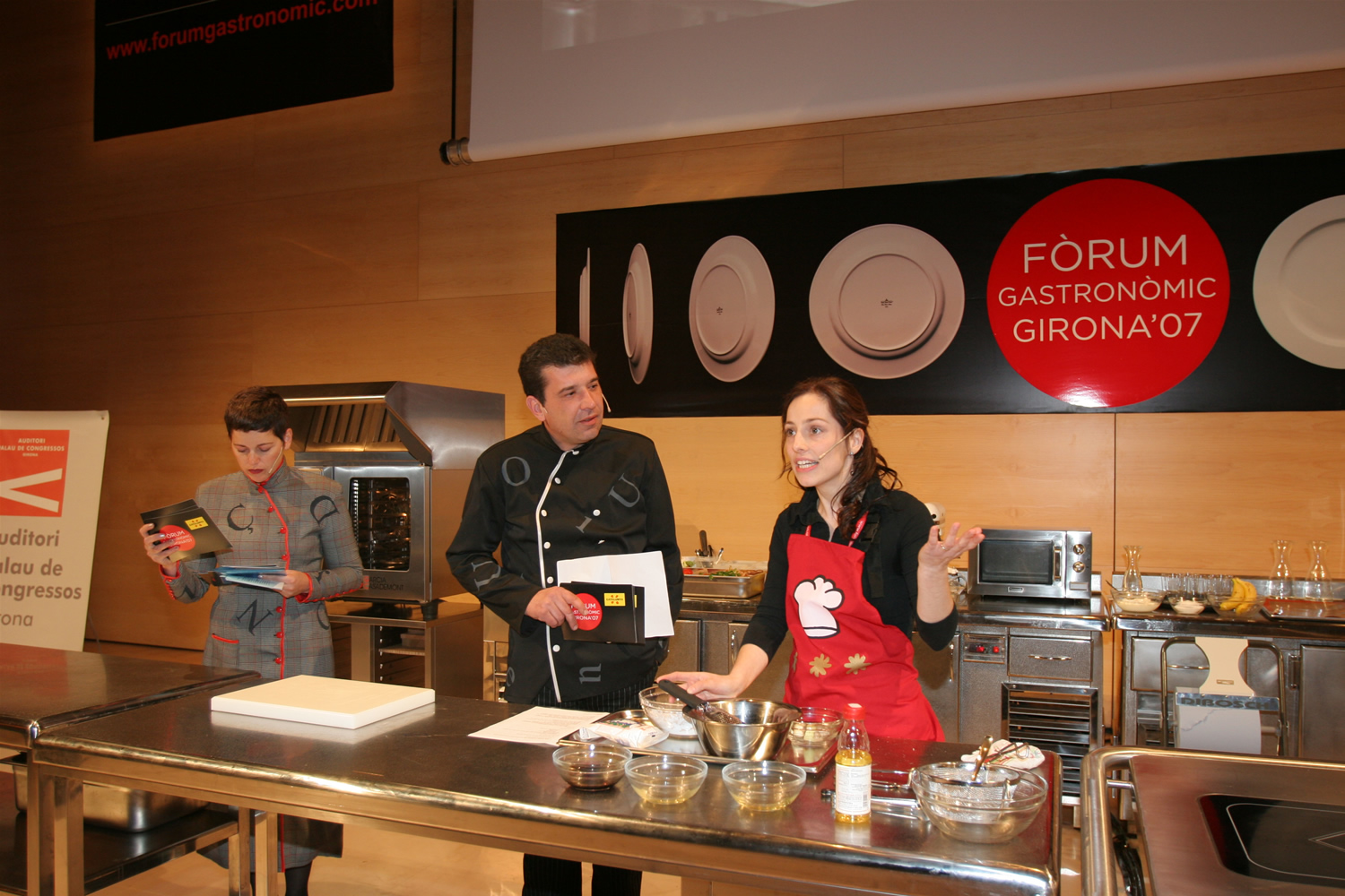 Marta Carnicero (a la dreta) al Fòrum Gastronòmic de Girona 2007.